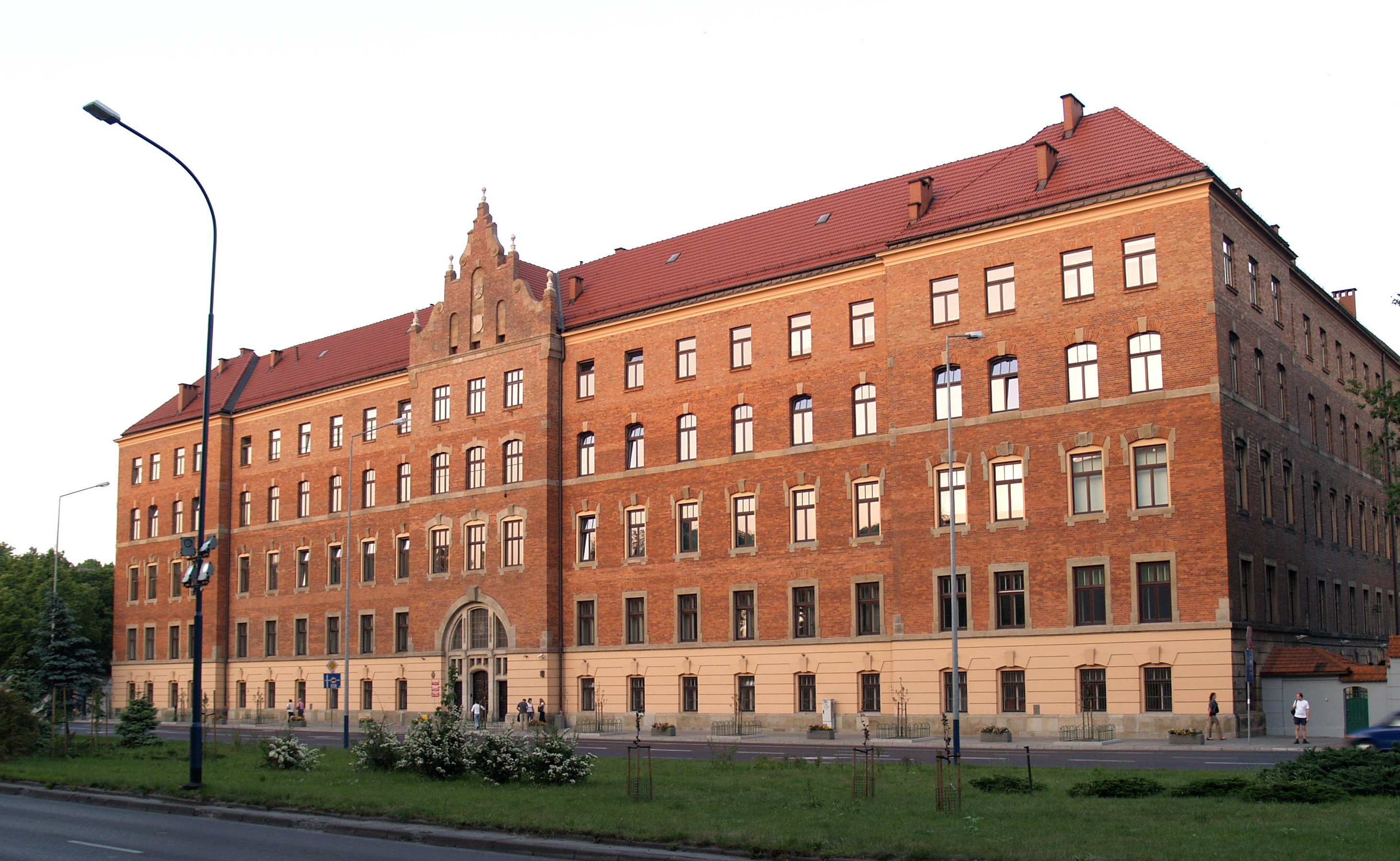 Uniwersytet Rolniczy w Krakowie, budynek główny, Collegium Godlewskiego